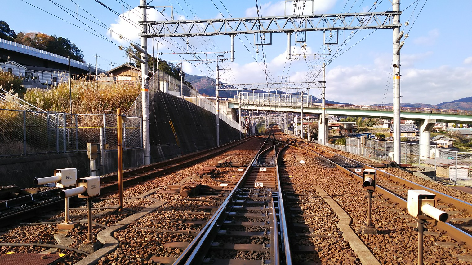 小原田信号所上り方